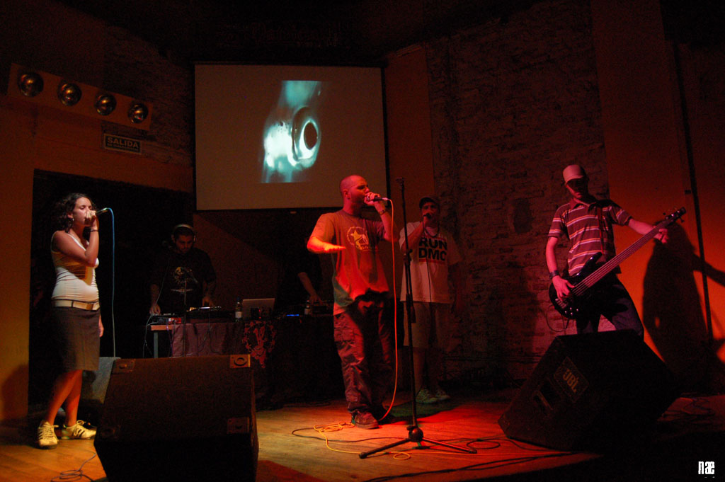 La Teja Pride en AlmodoBar.